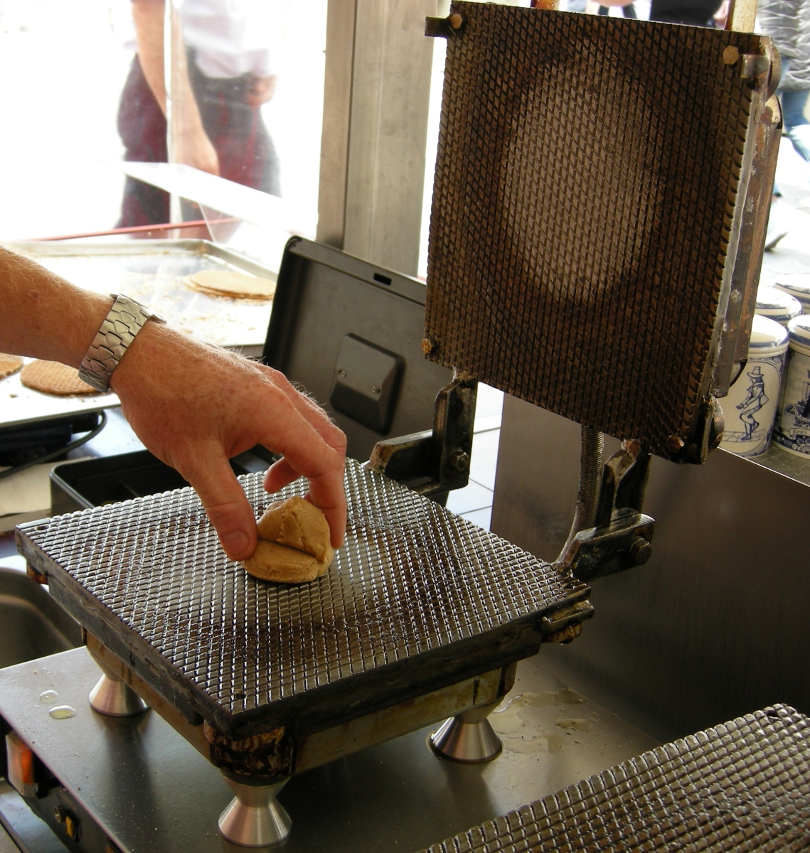 Een stroopwafelijzer op de markt in Nijmegen.